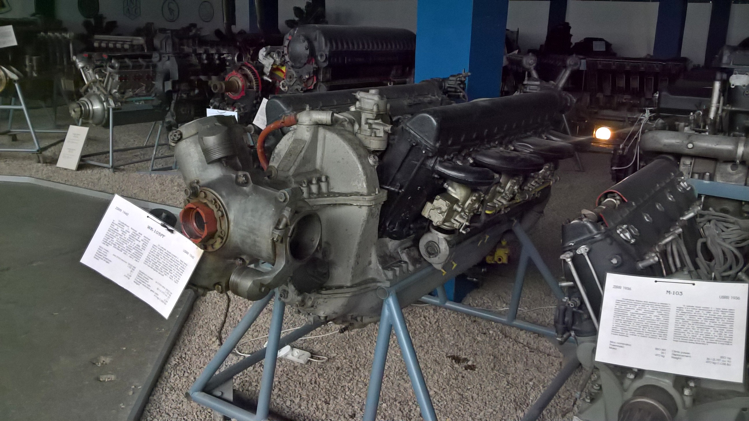 Radziecki 12-cylindrowy silnik widlasty WK-105PF2 z 1942 r. ze zbiorów Muzeum Lotnictwa Polskiego w Krakowie.